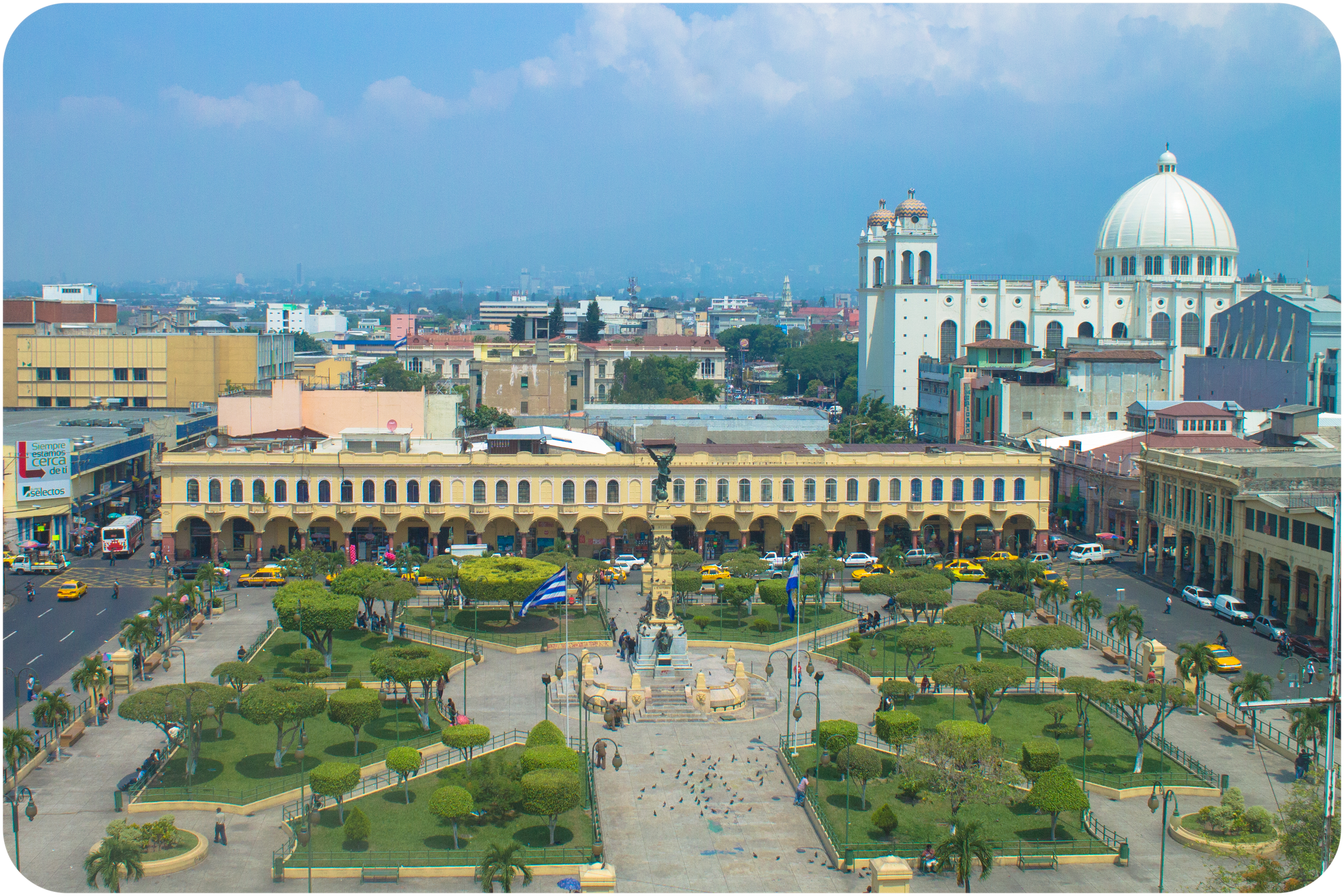 El Centro Histórico de San Salvador conserva arquitectura que nos evoca mucha historia de El Salvador en la siguiente imagen logramos apreciar los portales y la plaza libertad.